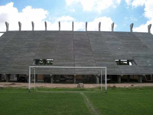 Tribuna Gutiérrez del Estadio de Chacarita Juniors